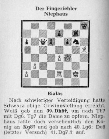 Partie Wolfram Bialas gegen Walter Niephaus, Endrunde der Deutschen Mannschaftsmeisterschaft im Schach, Februar 1955 in München.